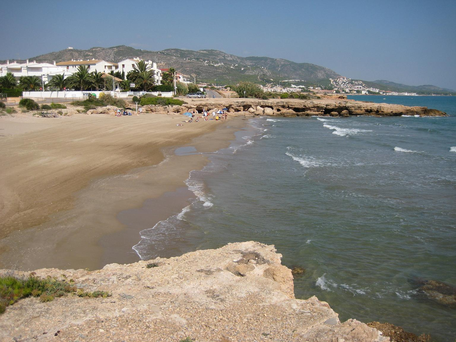 Platja del Moro a Alcossebre en el municipi d'Alcalà de Xivert